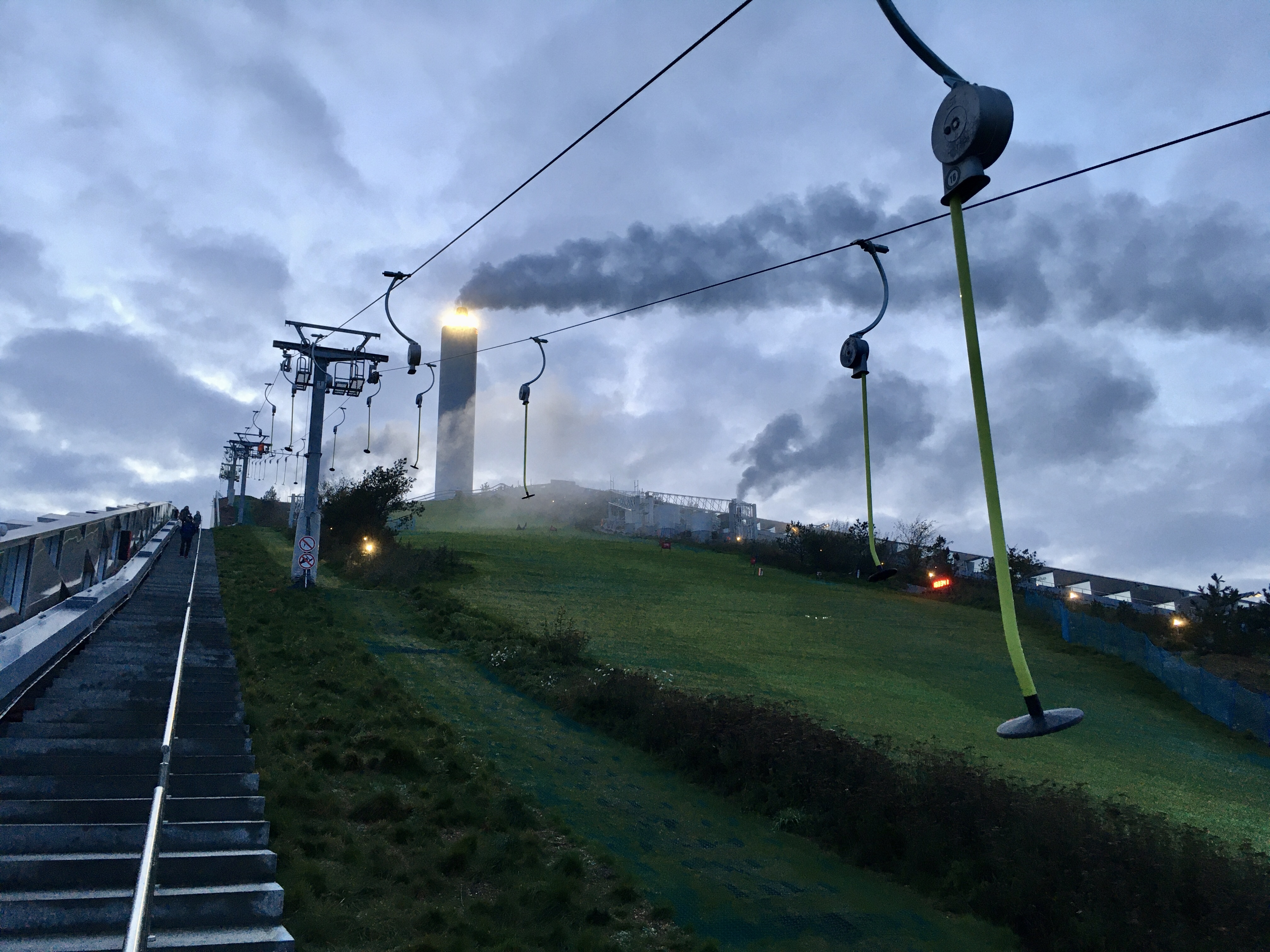 Skiing in Amager Bakke, Copenhagen